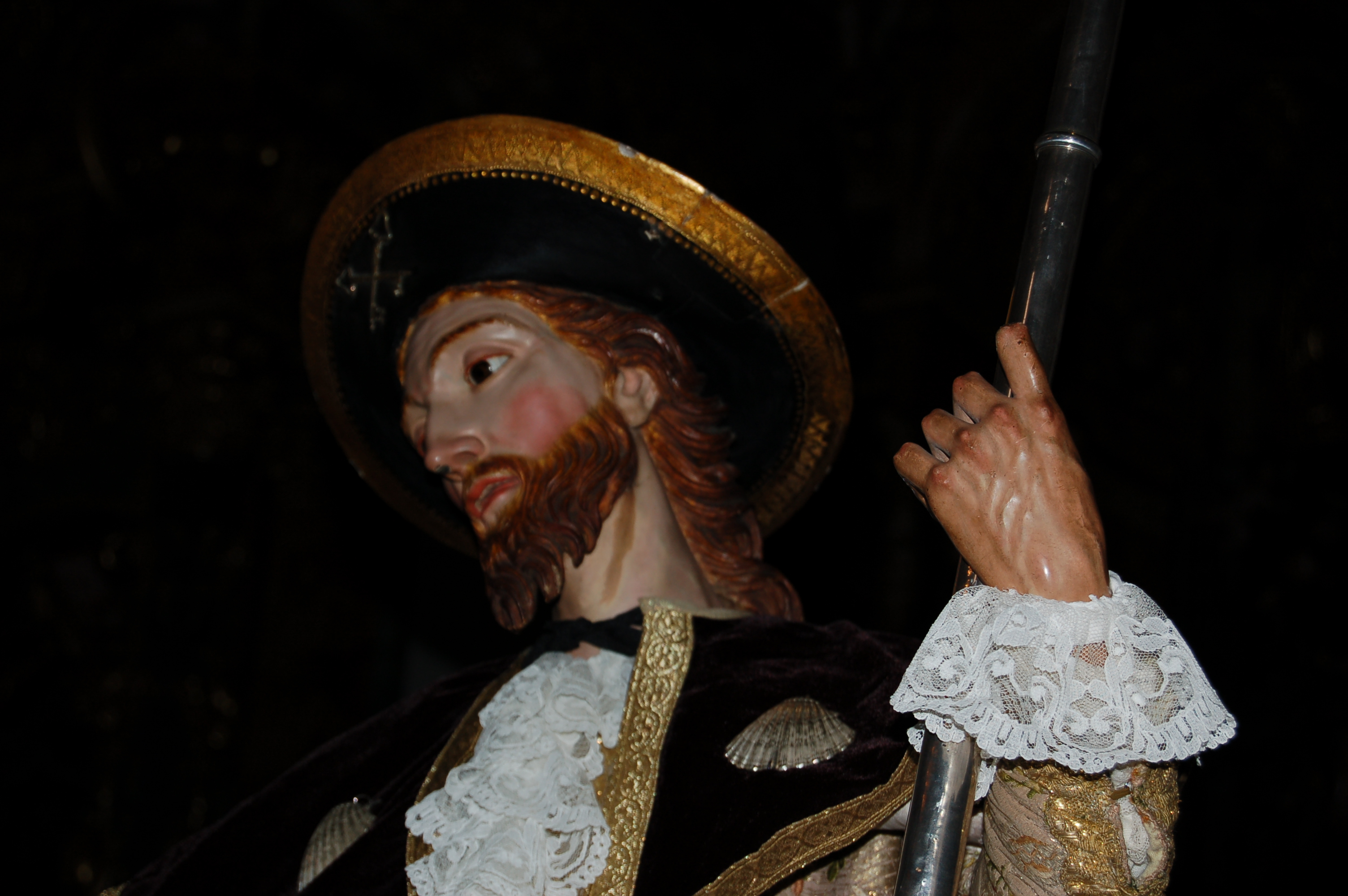 San Roque de Gambino. Capela de San Roque (Santiago de Compostela)